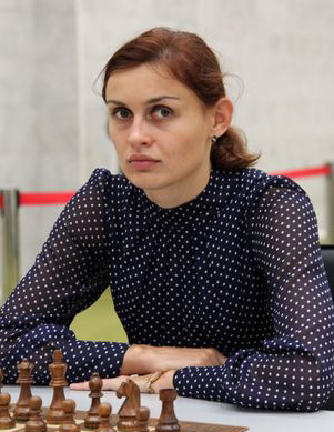 Марина Гусева, Суперфинал чемпионата России по шахматам 2015